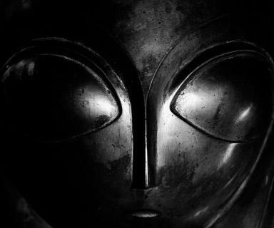 Mademoiselle Pogany de Constantin Brancusi